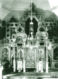 Спаська церква у Полтаві, іконостас (1909) Church of the Saviour in Poltava, iconostasis (1909) Eglise du Sauveur à Poltava, iconostase (1909)